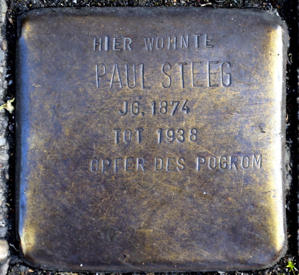 Stolpersteine in Solingen